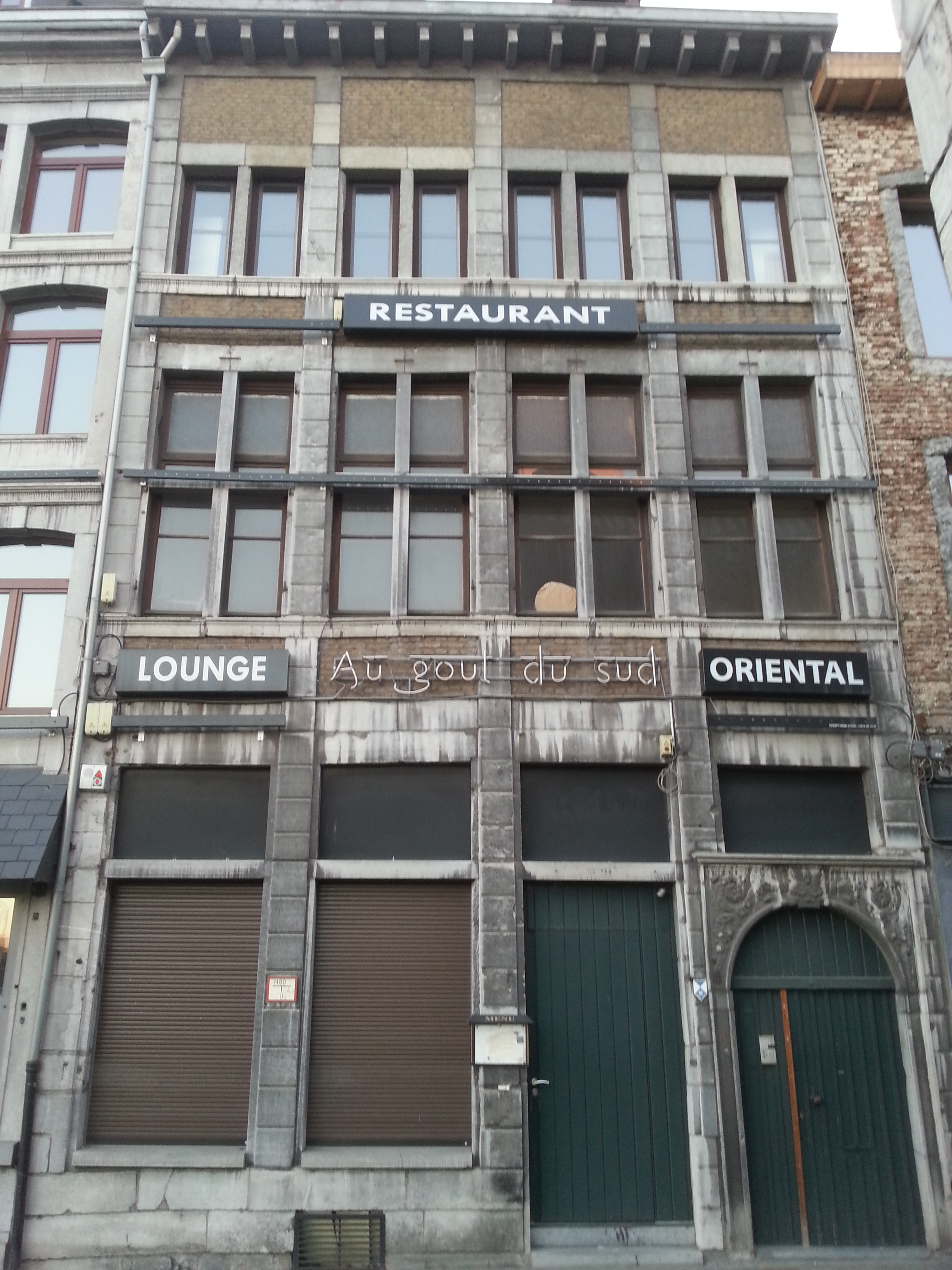 Maison (Façades et toitures)